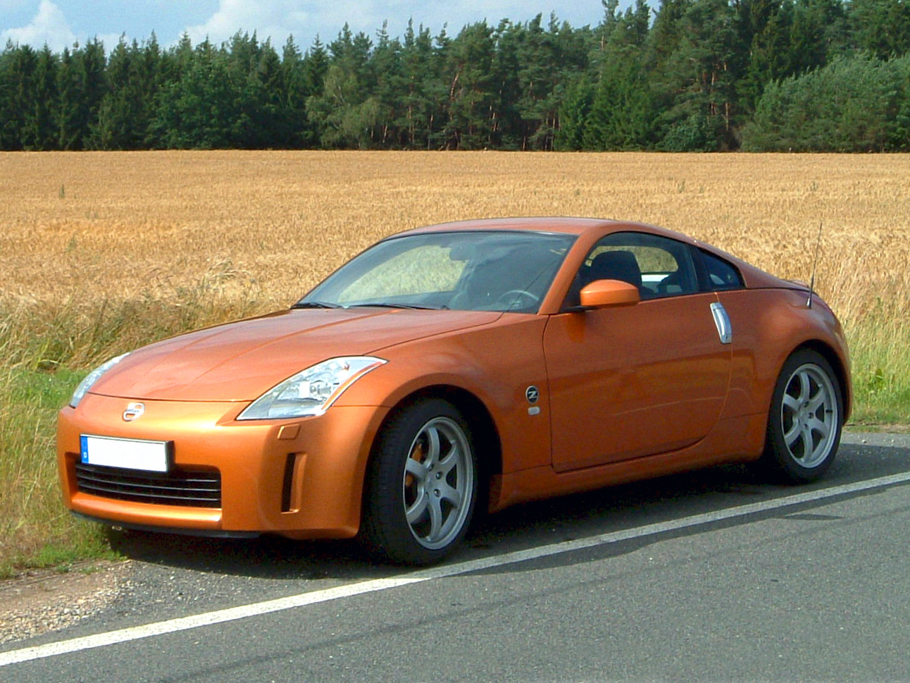 Nissan